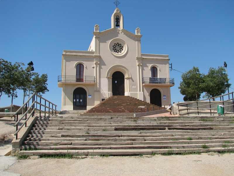 Ermita de Sant Ramón